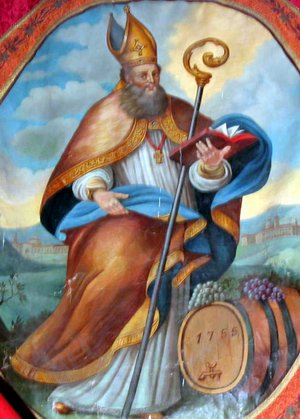 Der heilige Otmar mit Abtsstab und Weinfässchen. Zunftfahne der Weinhauer in Mödling, Kirche St. Othmar in Mädling.